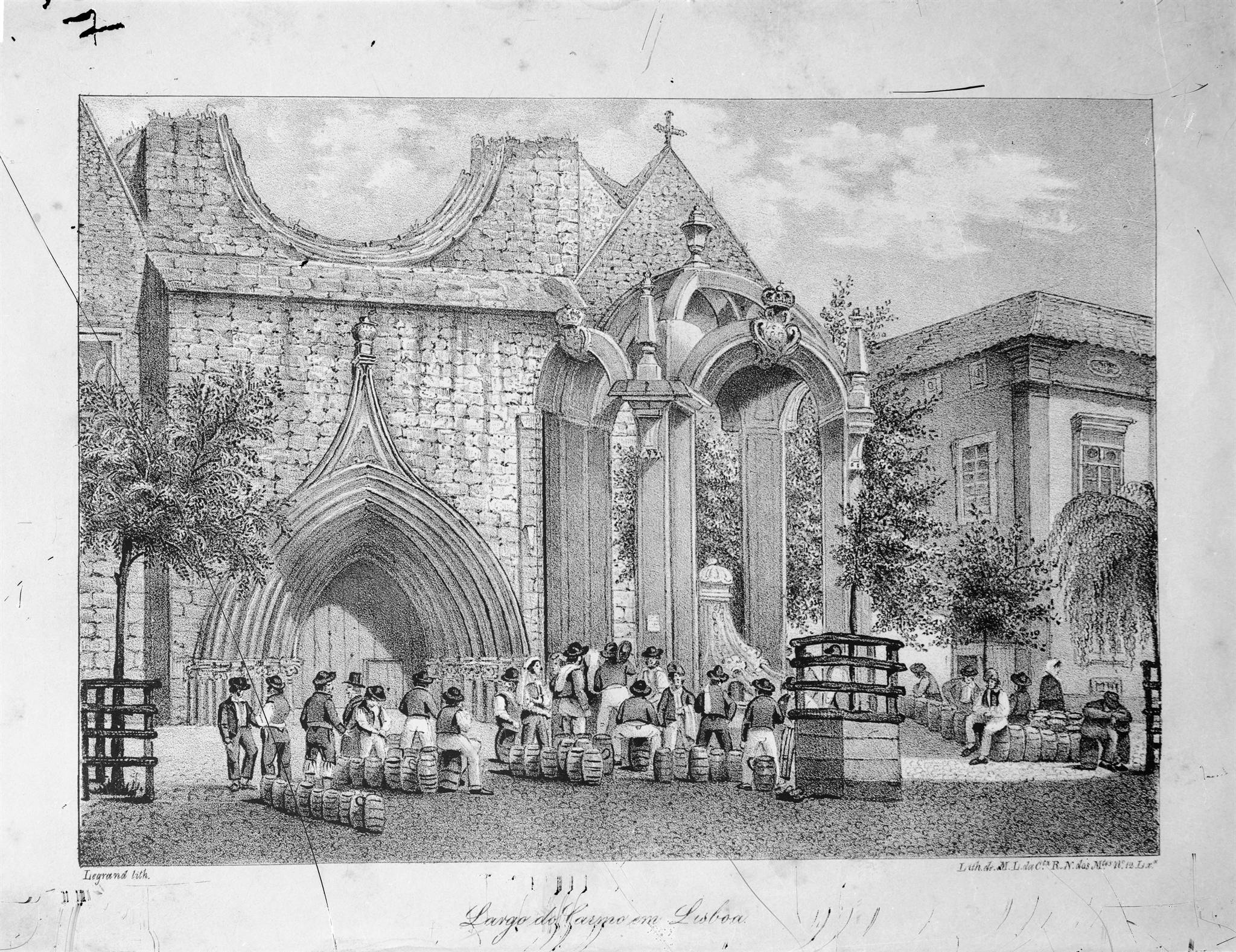 Título: Chafariz do largo do Carmo Dimensão: 13 x 18 cm Suporte: Negativo de gelatina e prata em vidro Unidades de descrição relacionadas: Cód. Referência: PT/AMLSB/POR/053179 Título: Chafariz do largo do Carmo, gravura Nota de publicação : DIAS, Marina Tavares - Lisboa desaparecida 5 . Lisboa : Quimera, 1996 Notas: Inscrição no original: 6154. Litografia de Legrand. Código de referência: PT/AMLSB/BAR/000844